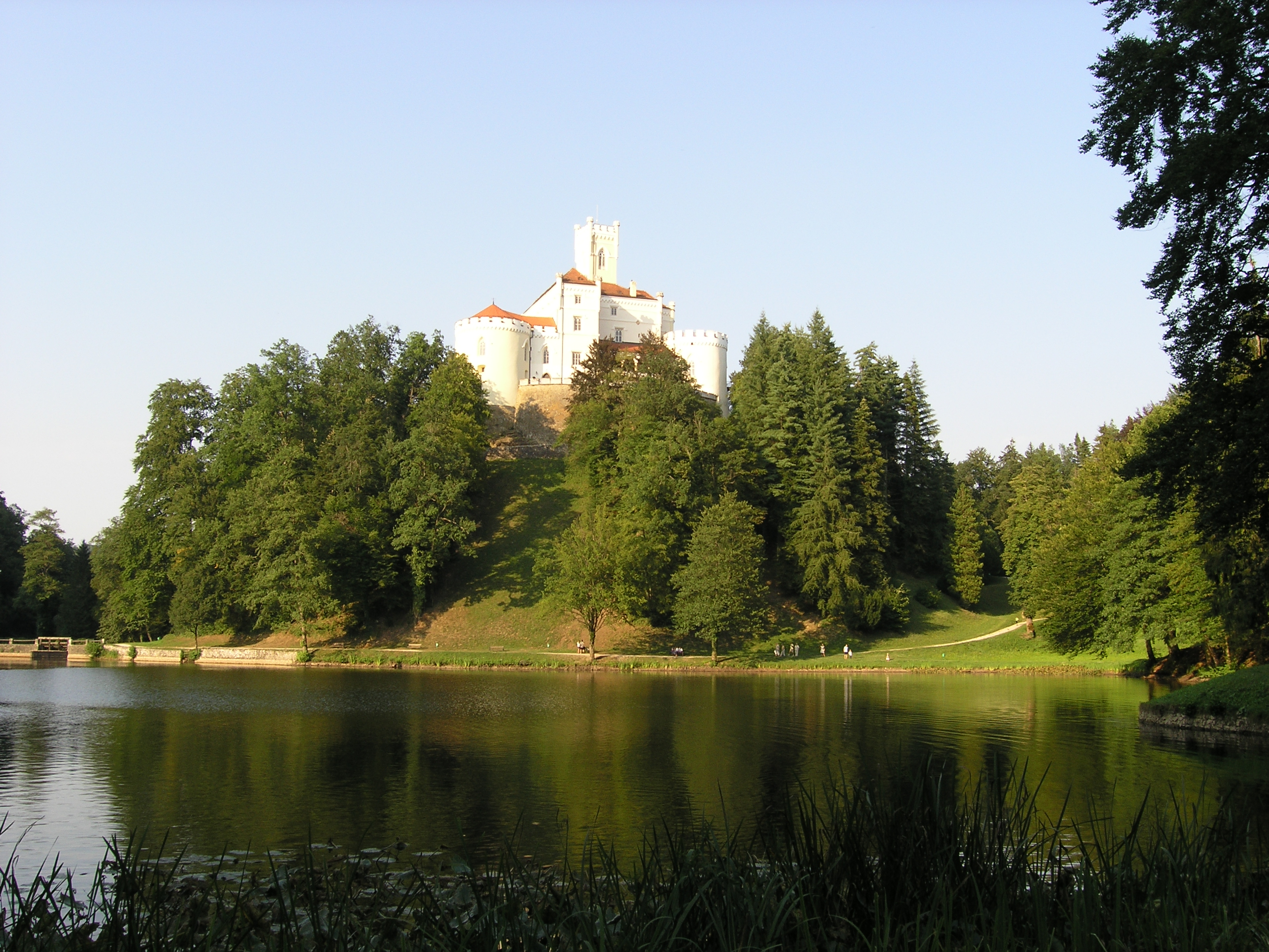 Trakošćan castle